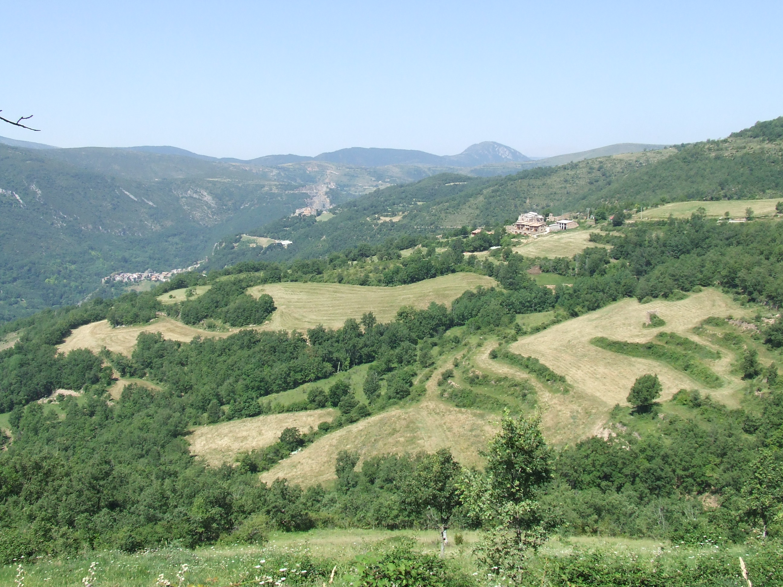 Bona part del terme municipal de Sarroca de Bellera (Pallars Jussà)